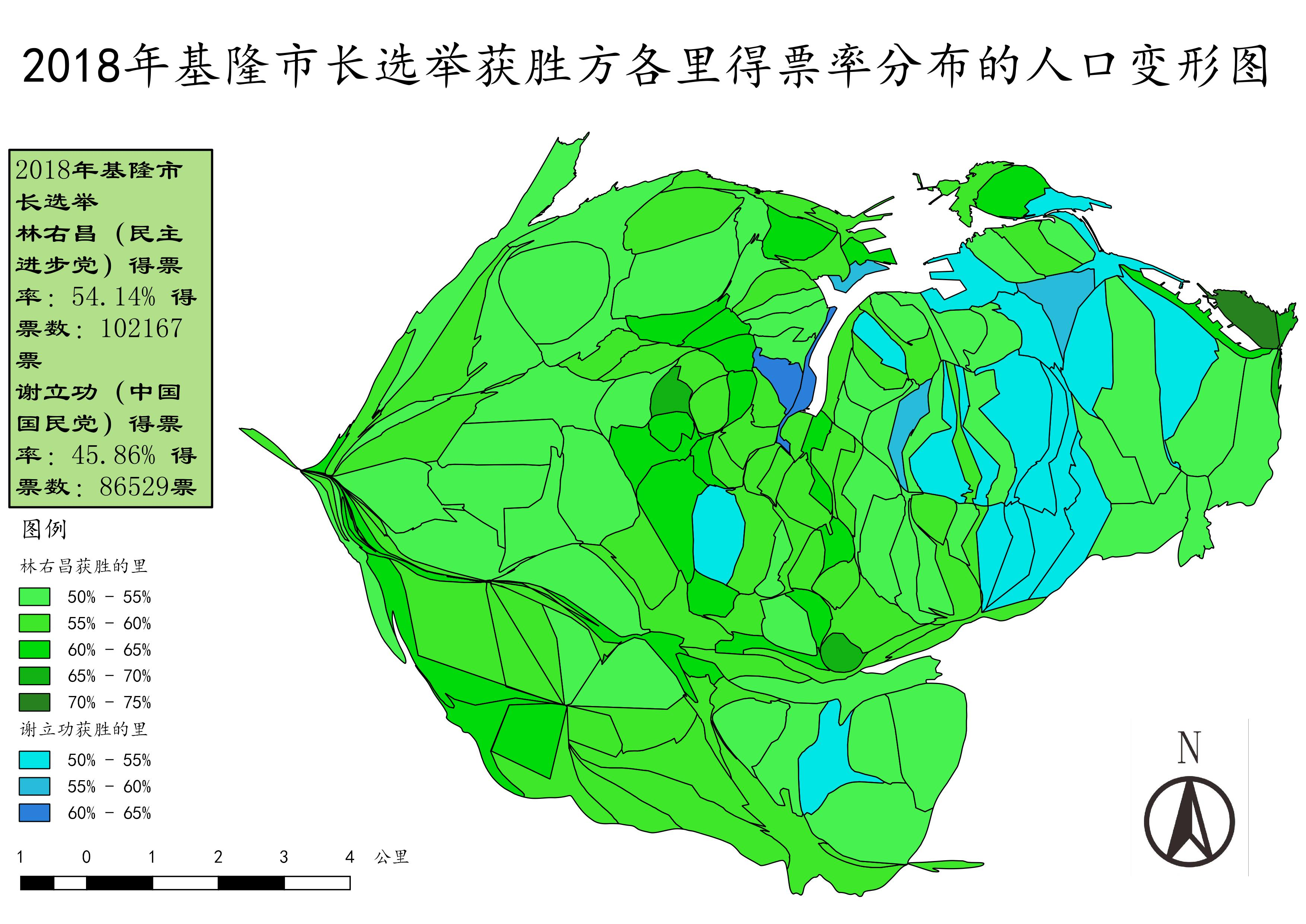 中文（中国大陆）: 这是2018年基隆市长选举地图的人口变形图